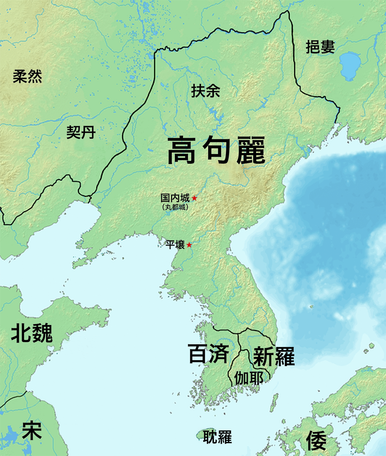 版図が最大に達した476年頃の高句麗と周辺諸国